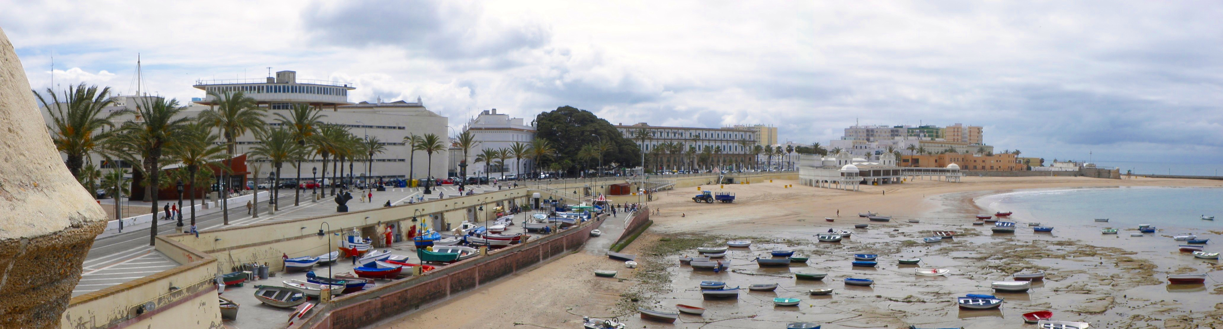 Panorámica de la playa de La Caleta, con las facultades y ficus al fondo, Cádiz, España. Tomada desde el Castillo de Santa Catalina.